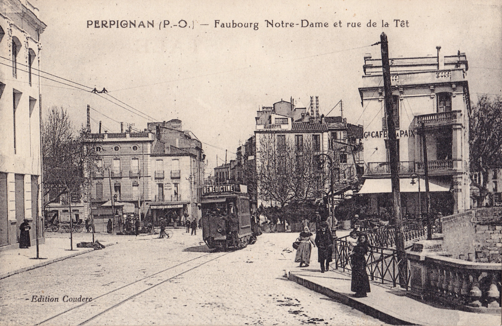 Carte postale ancienne éditée par COUDERC : PERPIGNAN - Faubourg Notre-Dame et rue de la Têt